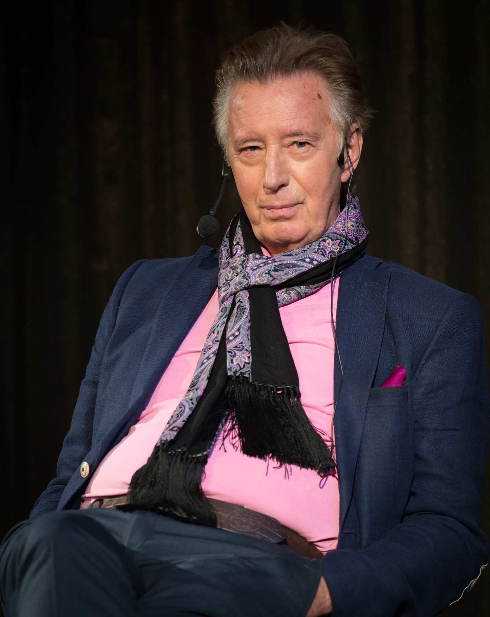 Thommy Berggren 2015.